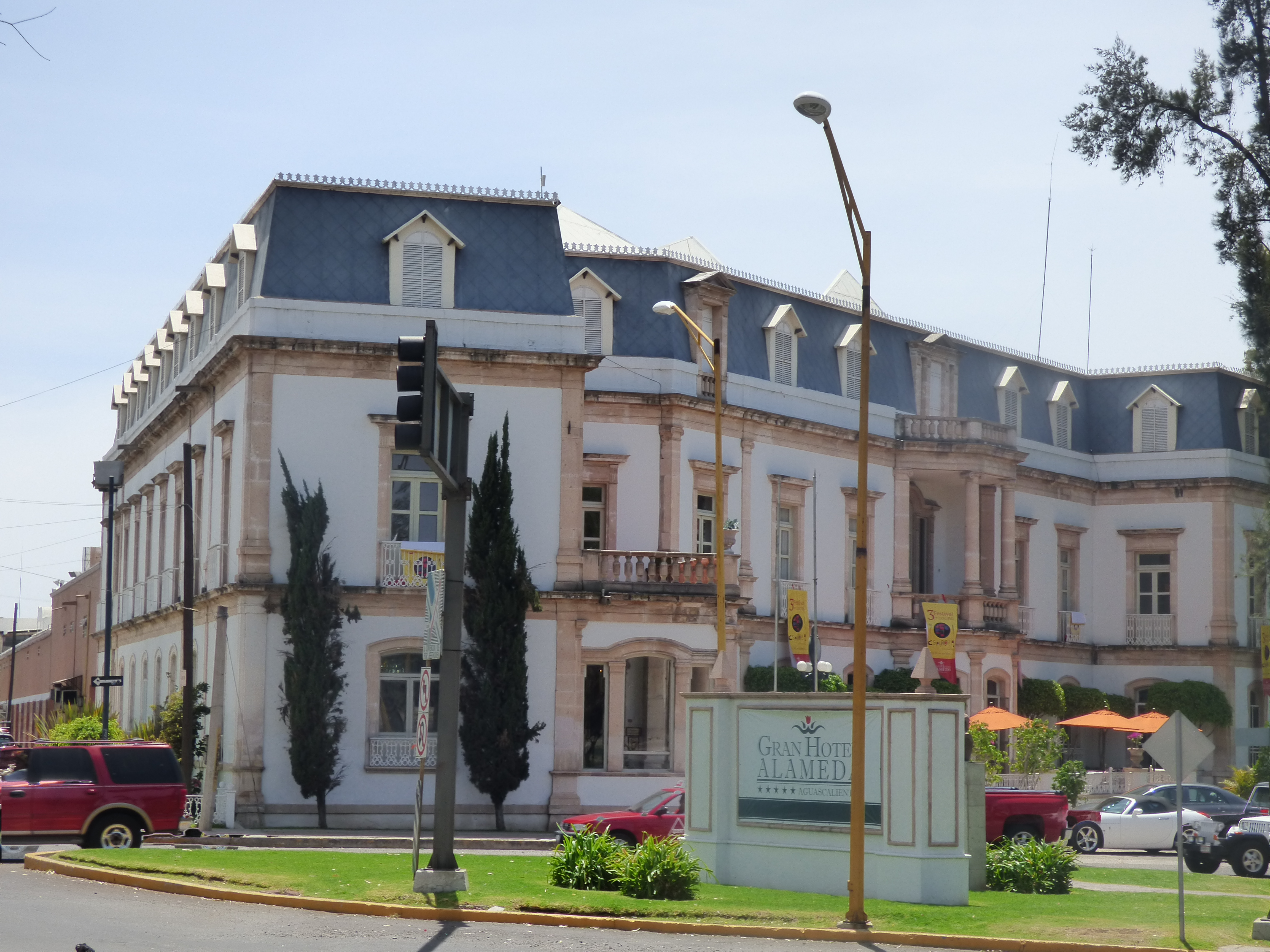 Construida por Refugio Reyes Rivas. Se trata de una edificación de corte francés de dos plantas. Posee algunas características neoclásicas y es de esquema de patio central.